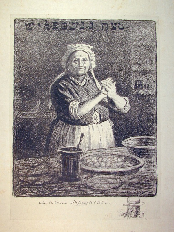 Frau in der Küche - Ende des 19.Jahrunderts